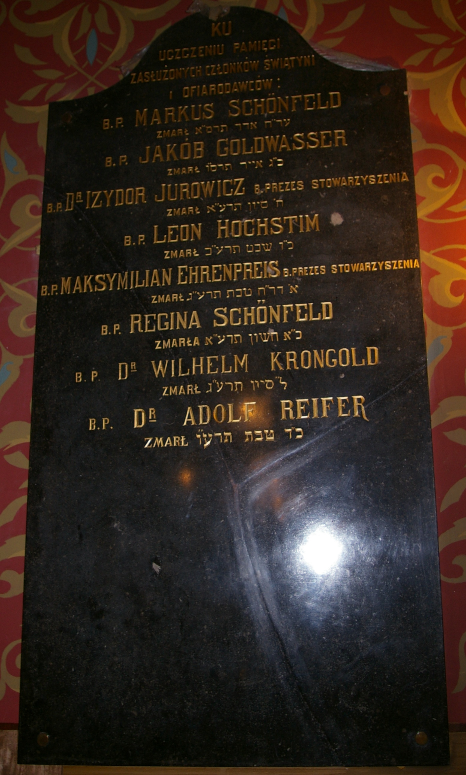 Tablica pamiętkowa w Synagodze Tempel w Krakowie